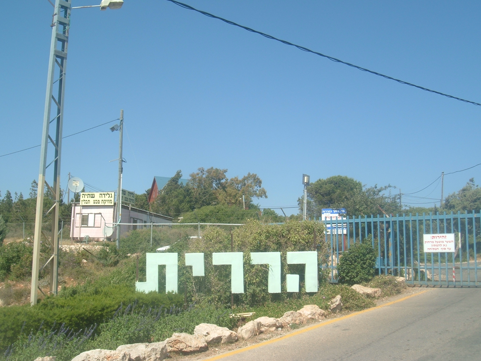 Hararit הררית